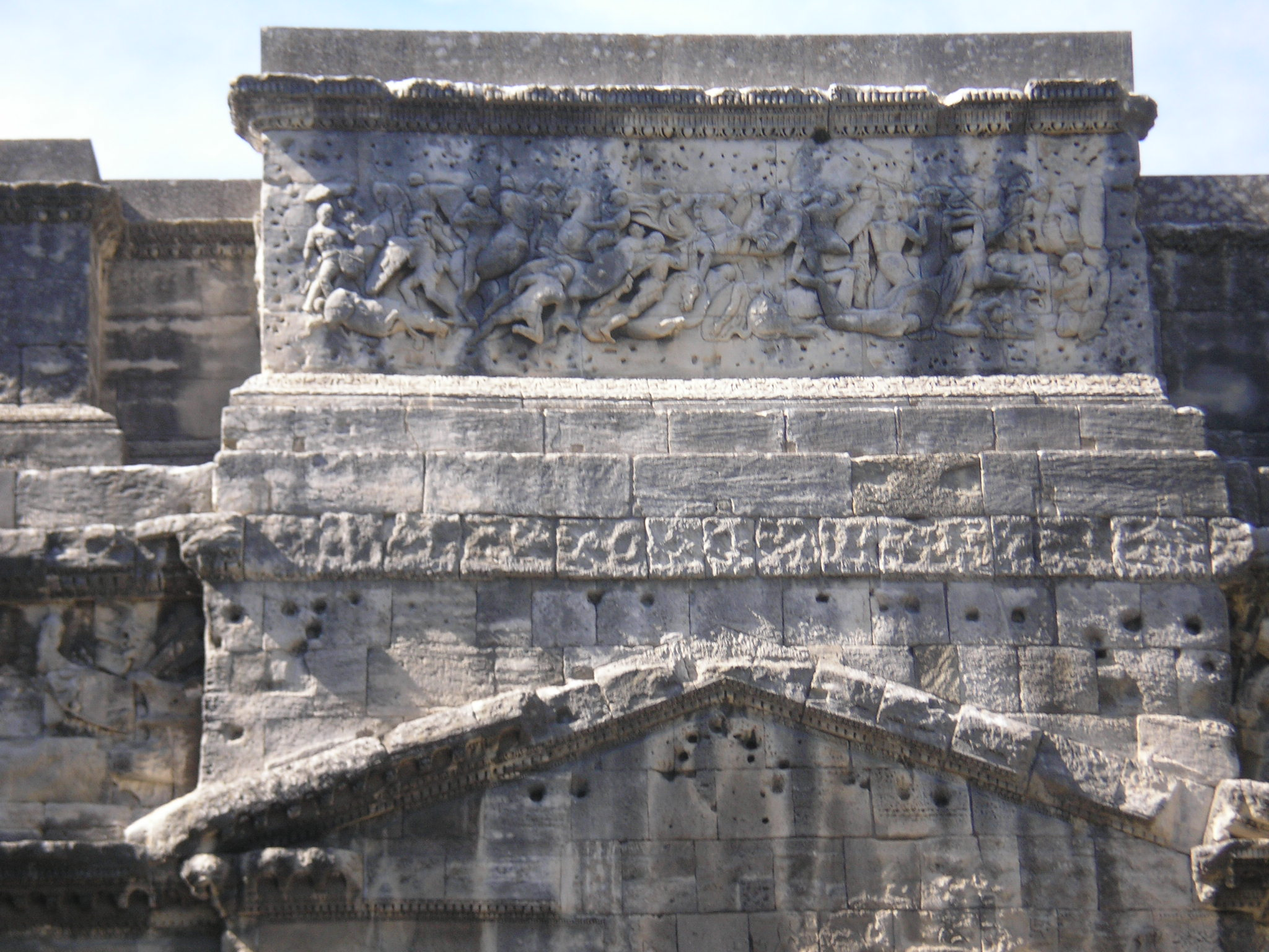 Orange (Vaucluse) - Frise de l'arc de triomphe.